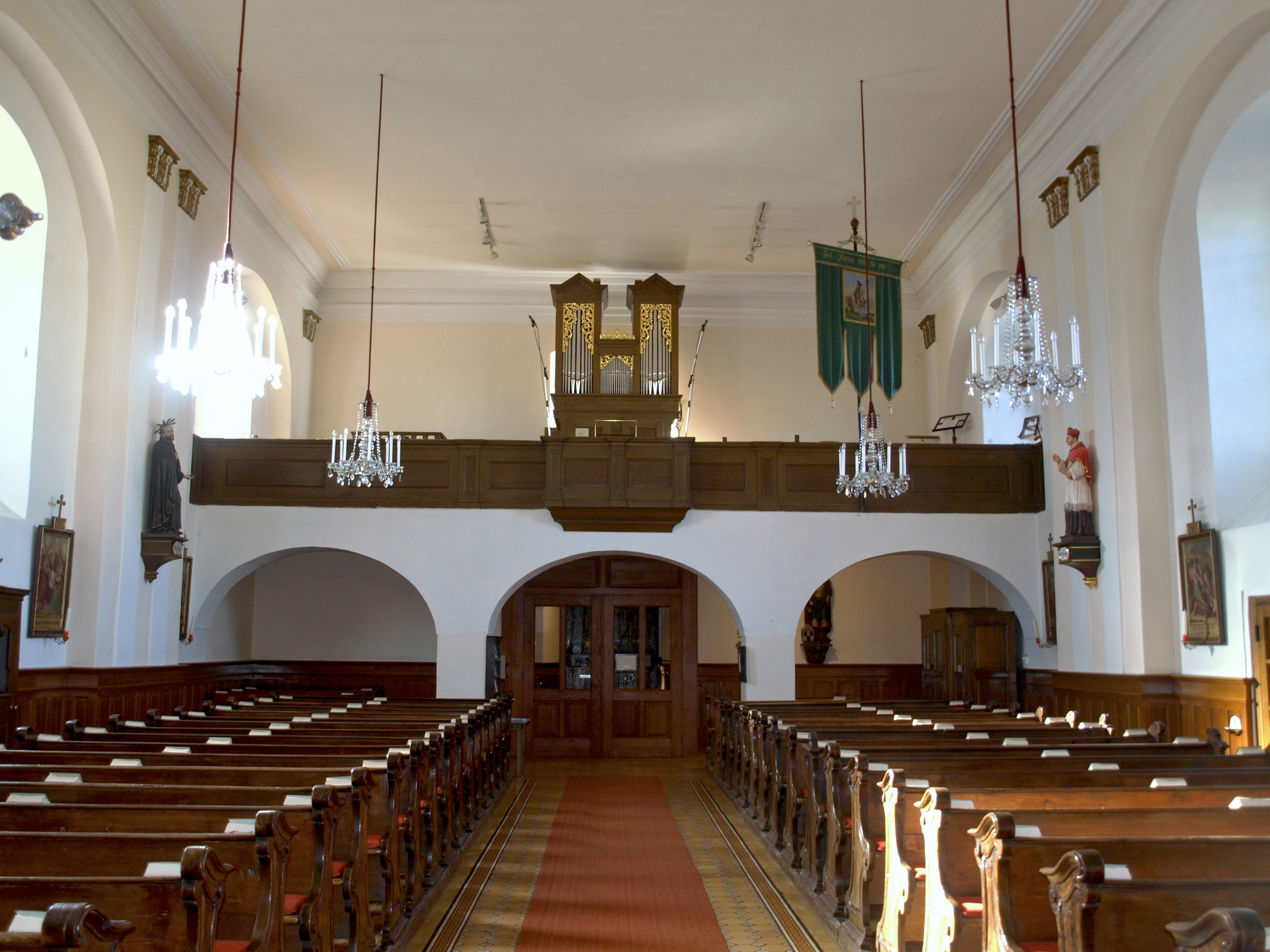 Kath. Pfarrkirche hl. Florian